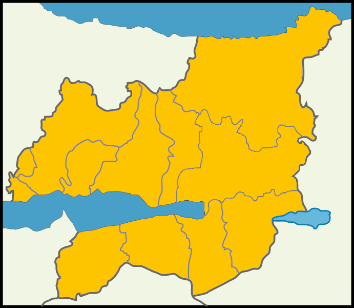 Kocaeli'de 2014 Türkiye cumhurbaşkanlığı seçimi